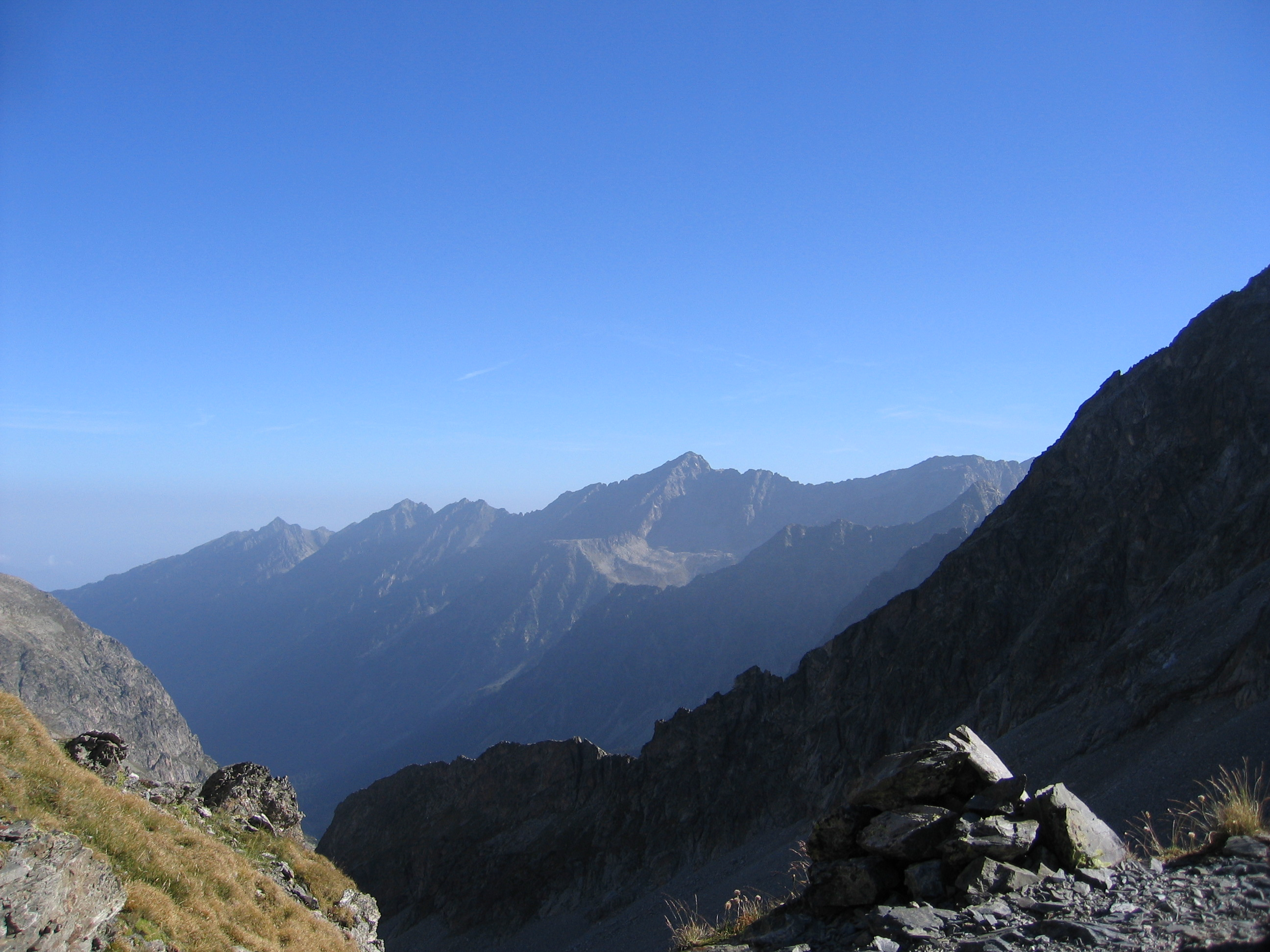 Ardiden (2988 m ; sommet triangulaire le plus haut sur l'horizon) vu du col de Labas (2719 m, entre le pic de Labas (2946 m) et le pic de la Sède (2976 m))